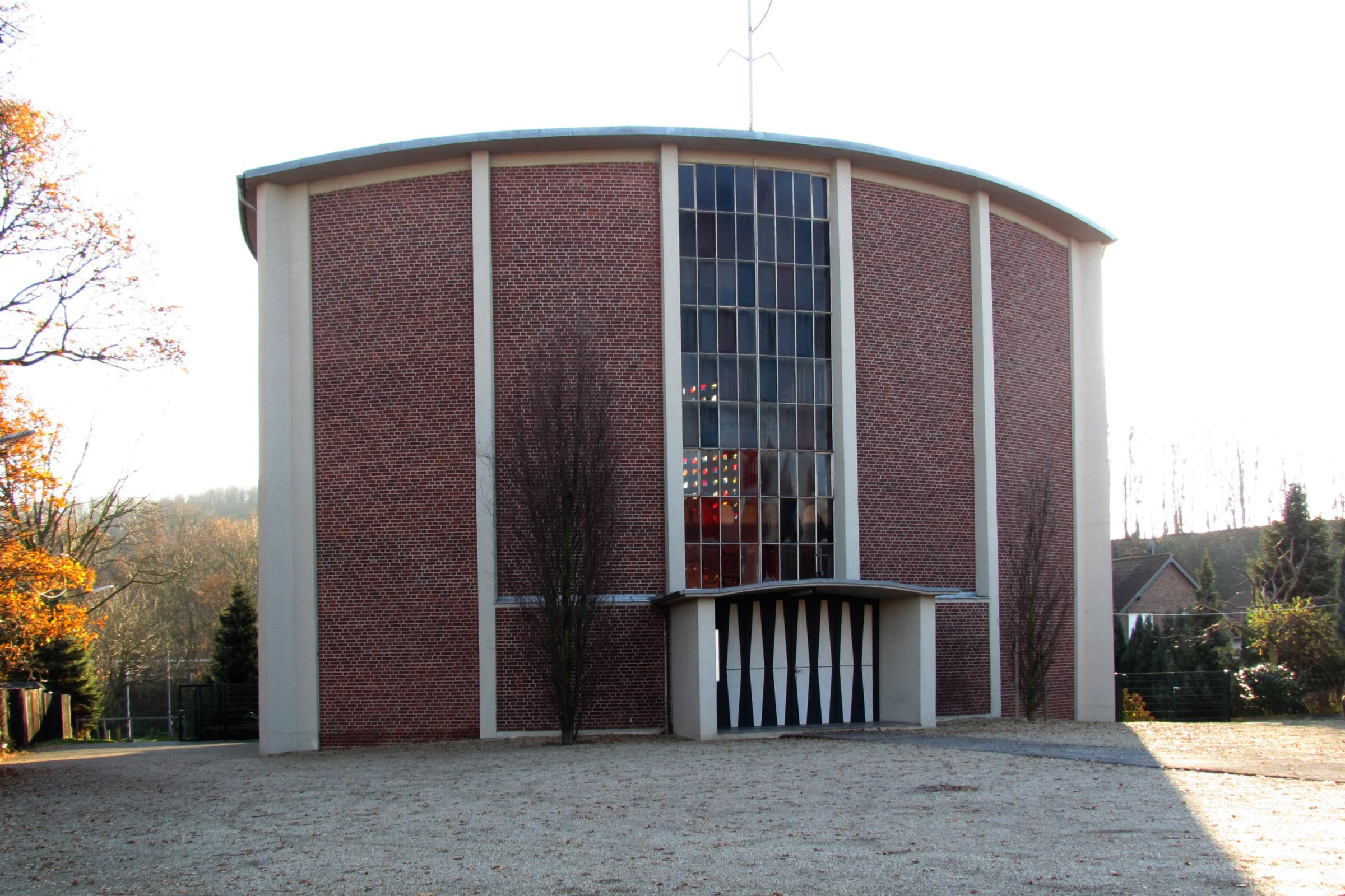 Kirchen und Kapellen in Erkelenz